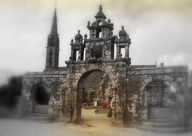 église Argol, denez goasguen.